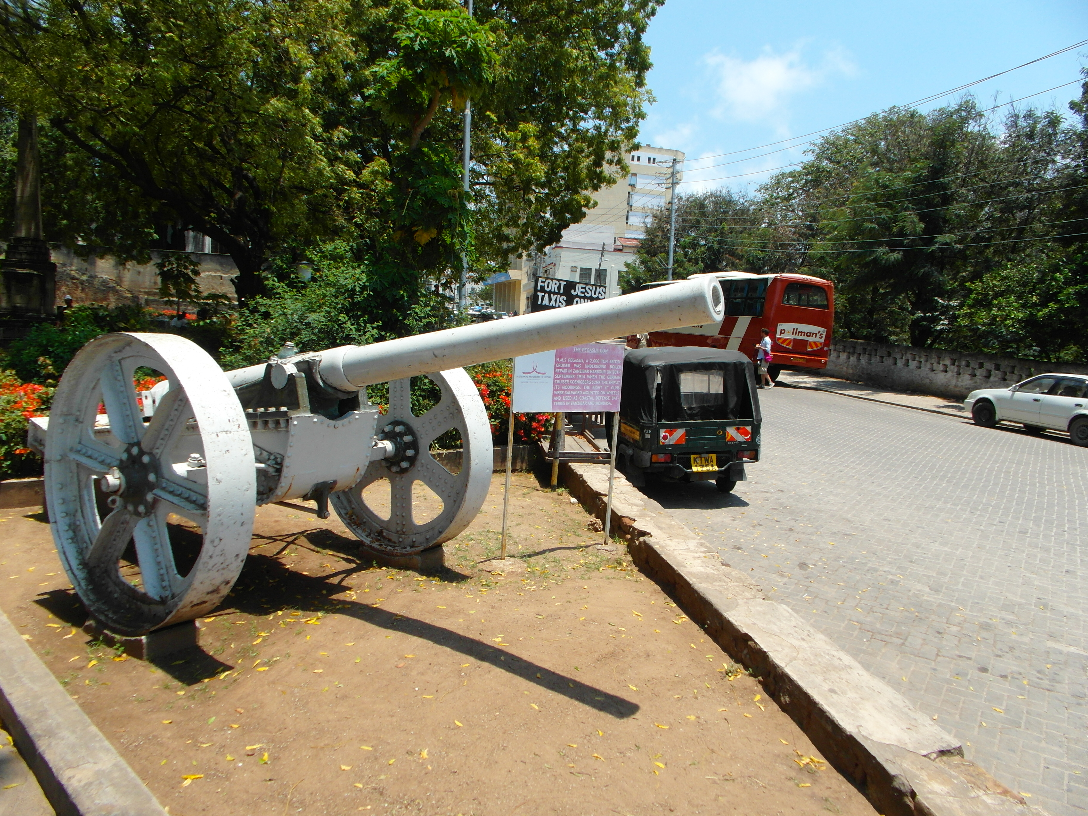 Mombasa, Kenya 2013.